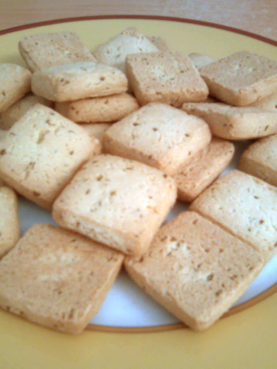 Des canistrelli aux grains d’anis